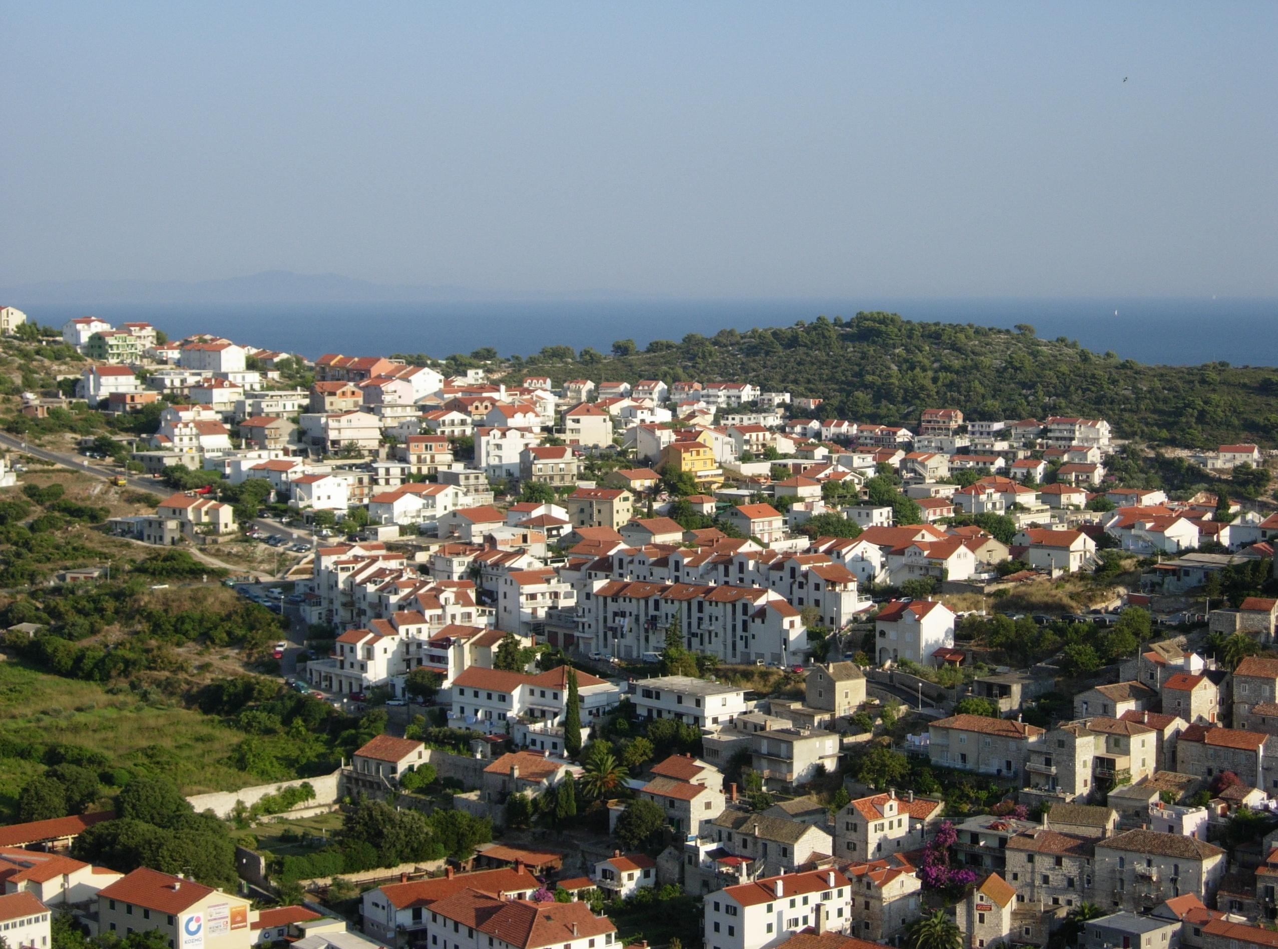 Bukainka, Hvar.